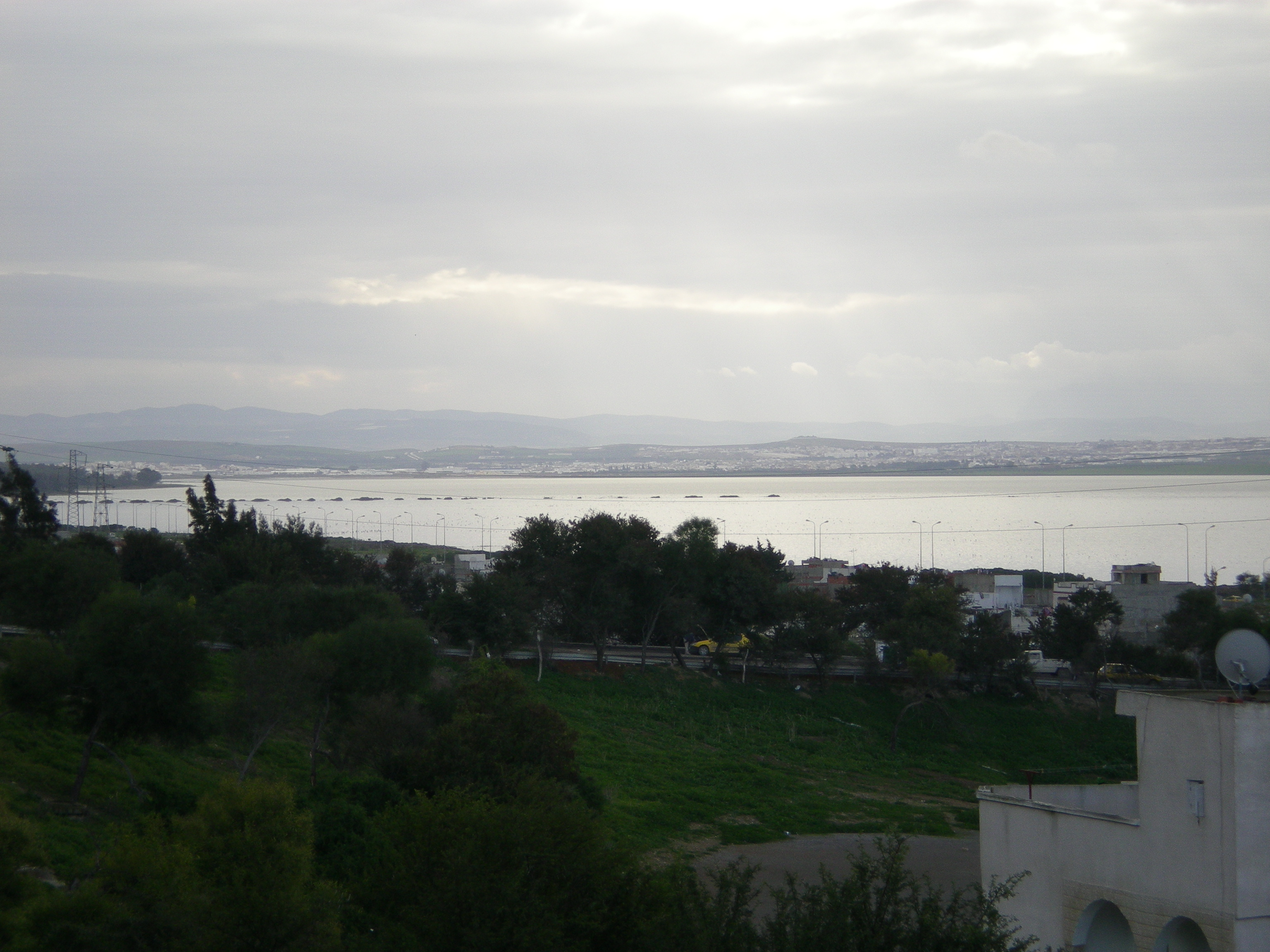 Sebkha Séjoumi, Tunis